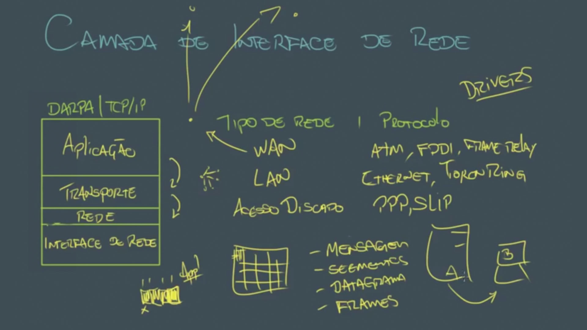 Camada de Interface de Rede TCPIP